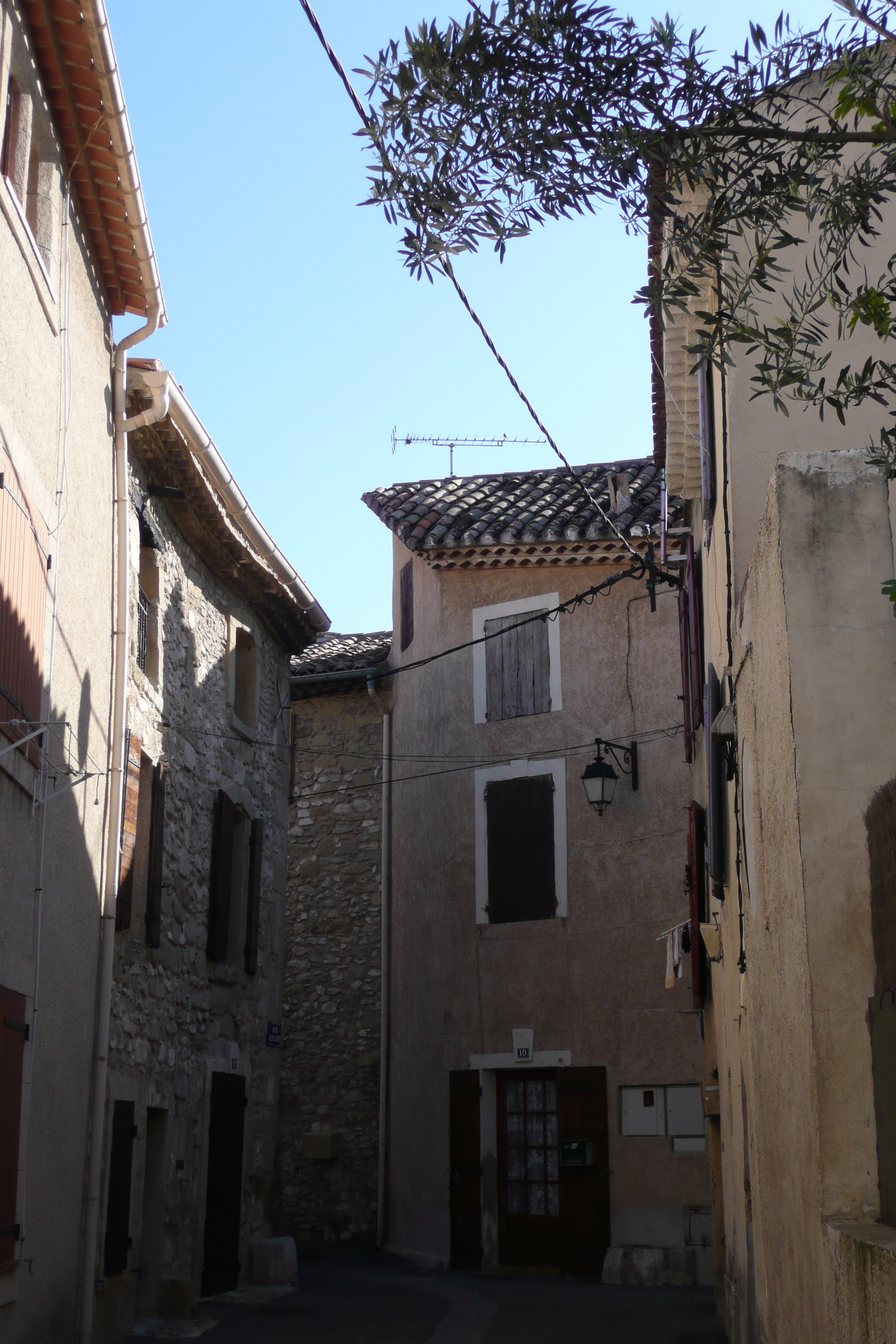 Sénas.